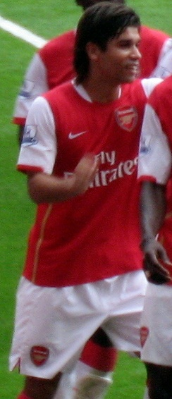 Eduardo da Silva